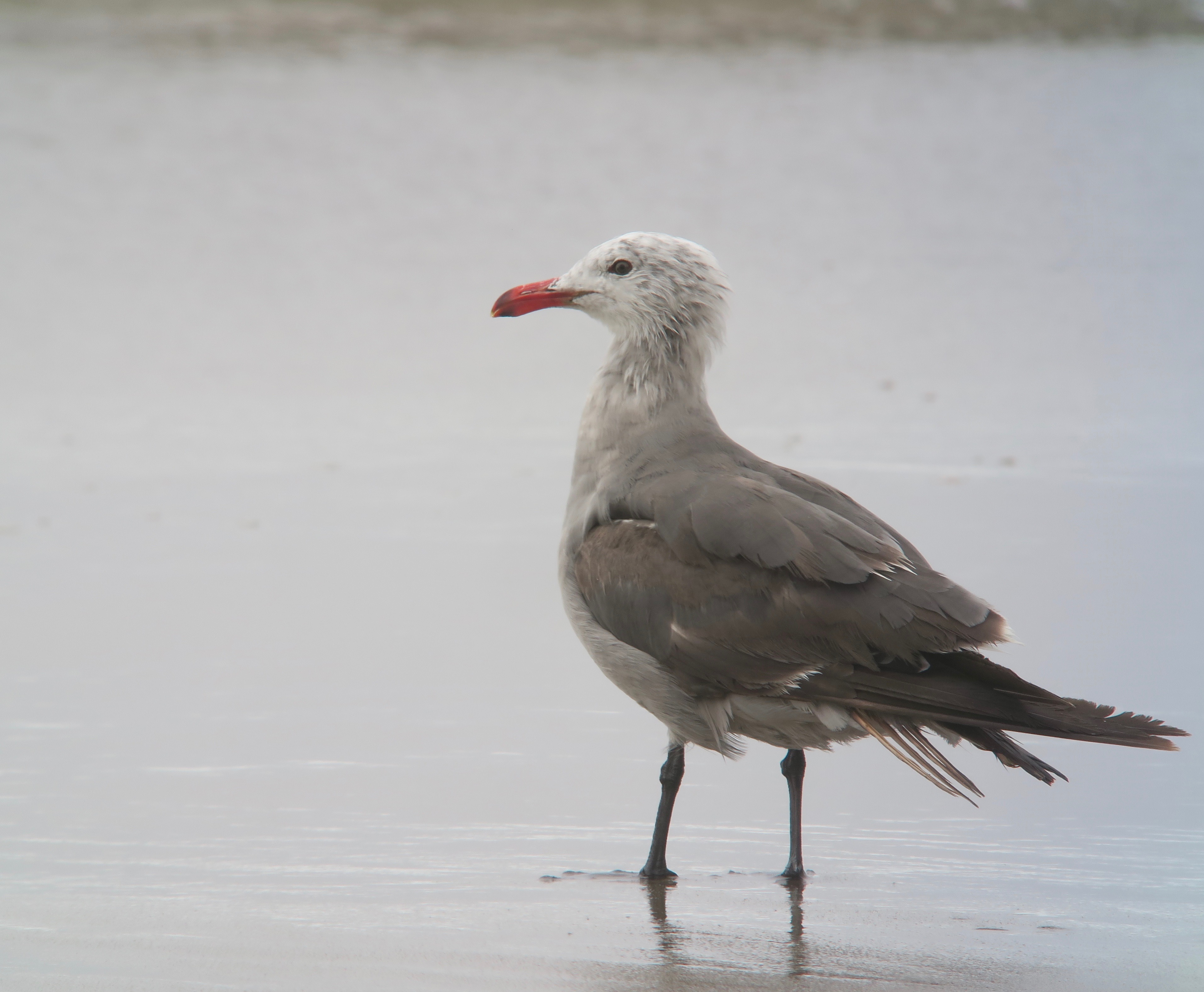 Goéland de Heerman en plumage d'hiver.